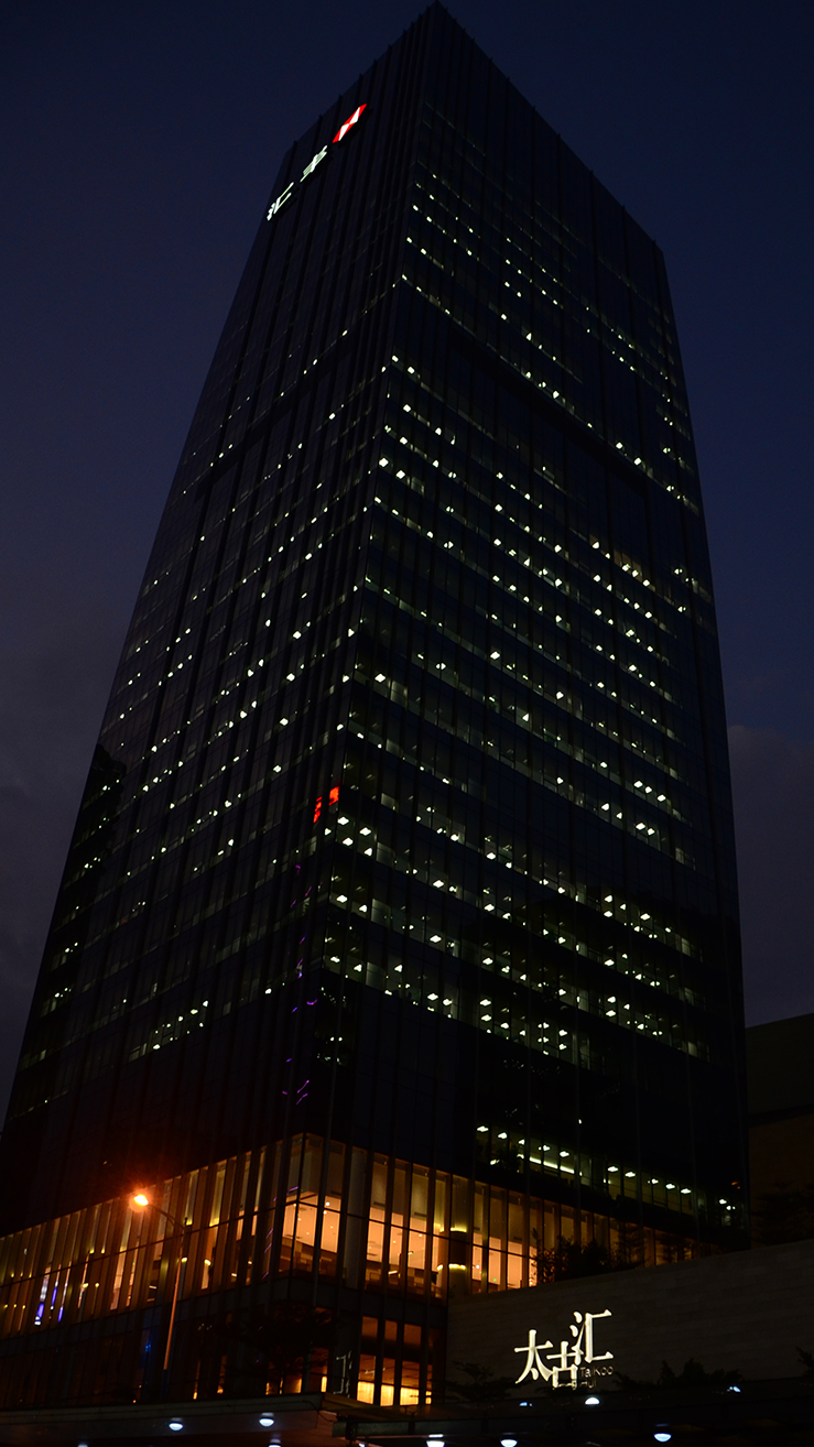 太古匯夜景